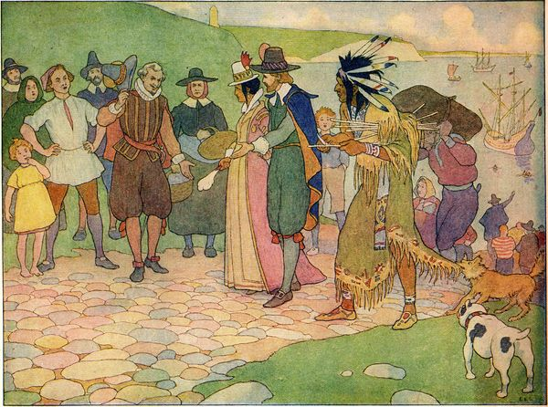 Pocahontas, 1906, par Elmer Boyd Smith.